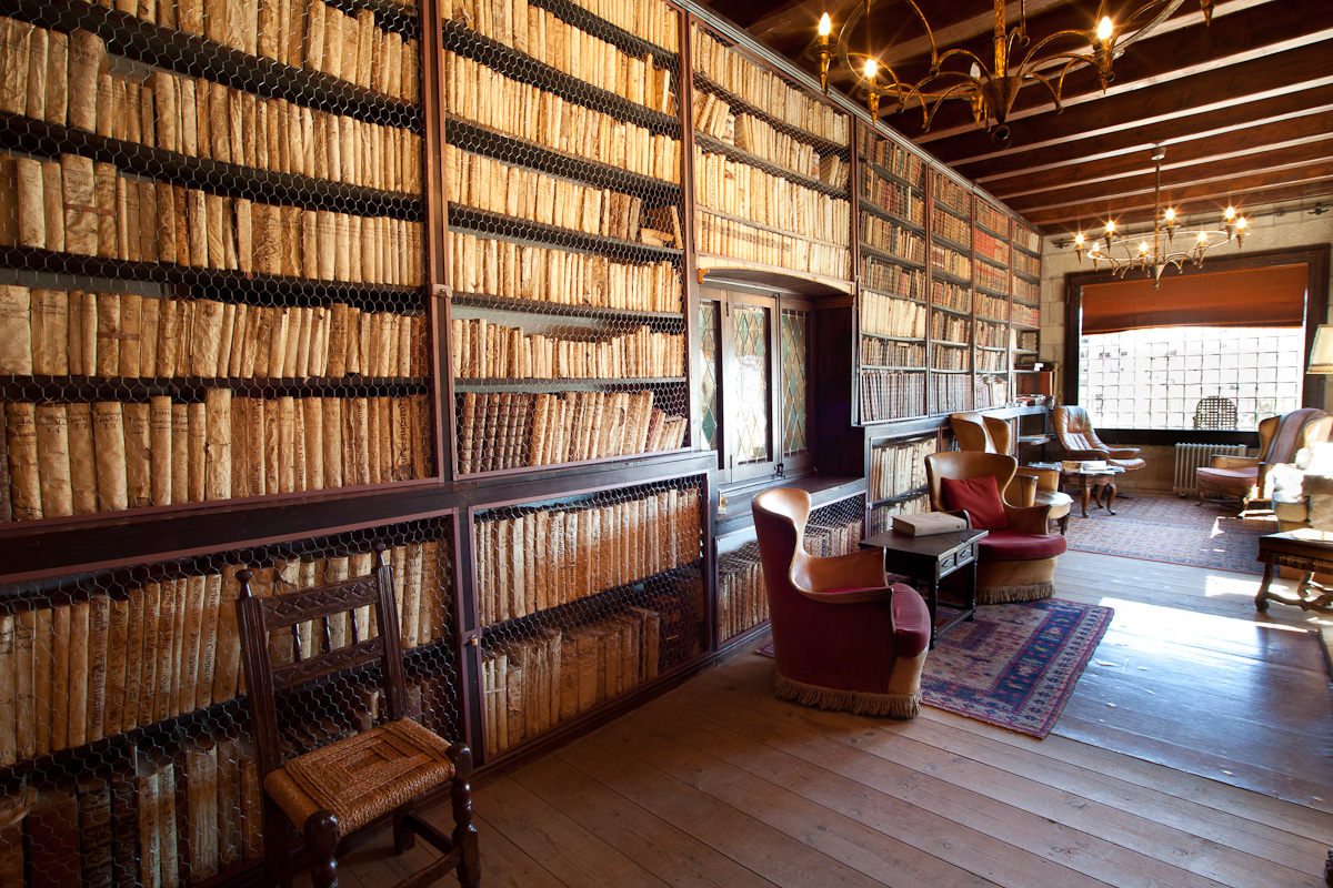 La Biblioteca del Palauet, amb exemplars que daten del segle XVII